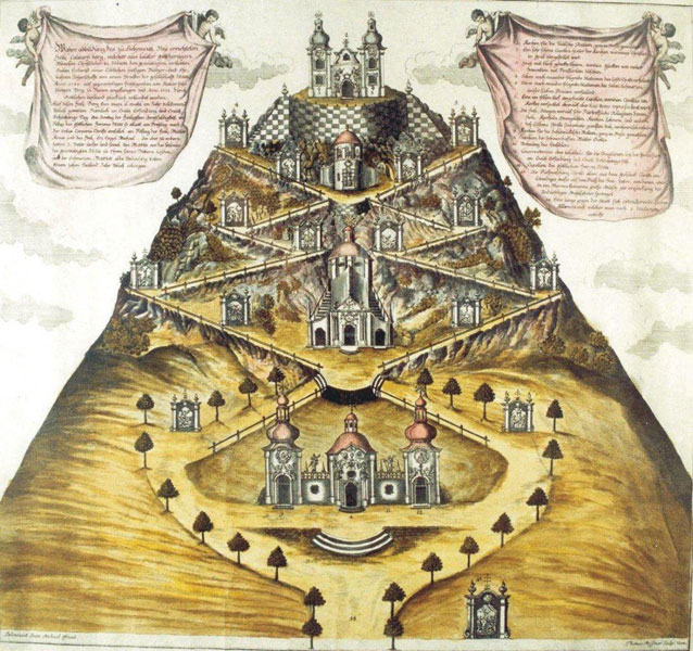 Selmecbányai híres kálvária, 18.századi színes illusztráció